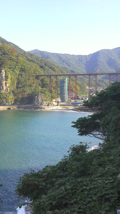 現在架け替え工事が進行中の餘部橋りょう。現橋の影に新橋の橋脚が立ち始めている。